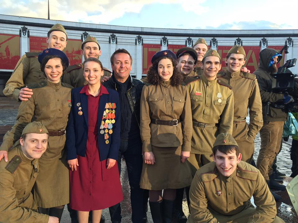 С актерами на съемках фильма к Дню Победы для проекта #ЖИТЬ